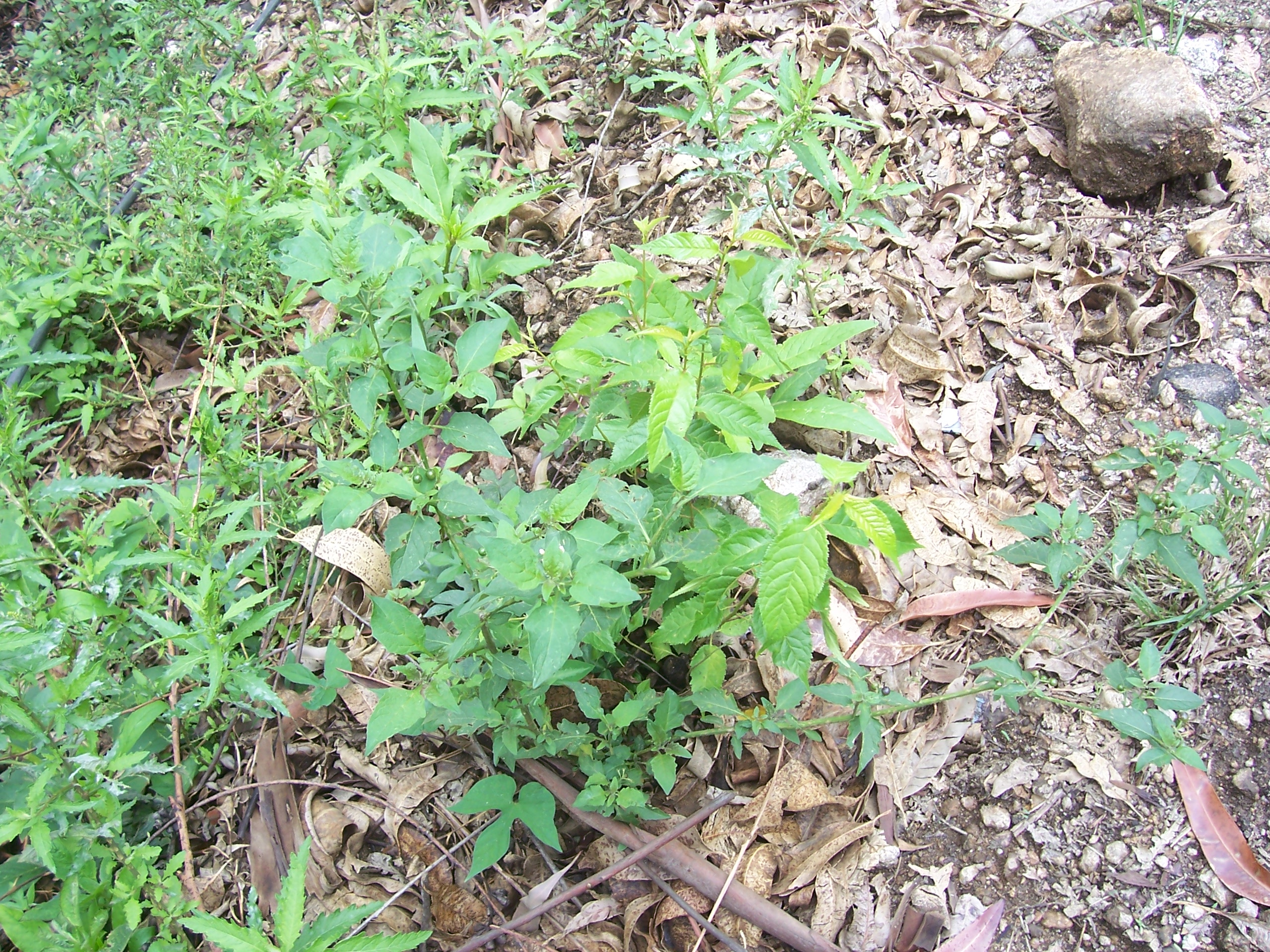 Plant de cari à Munnar (Kerala - Inde).